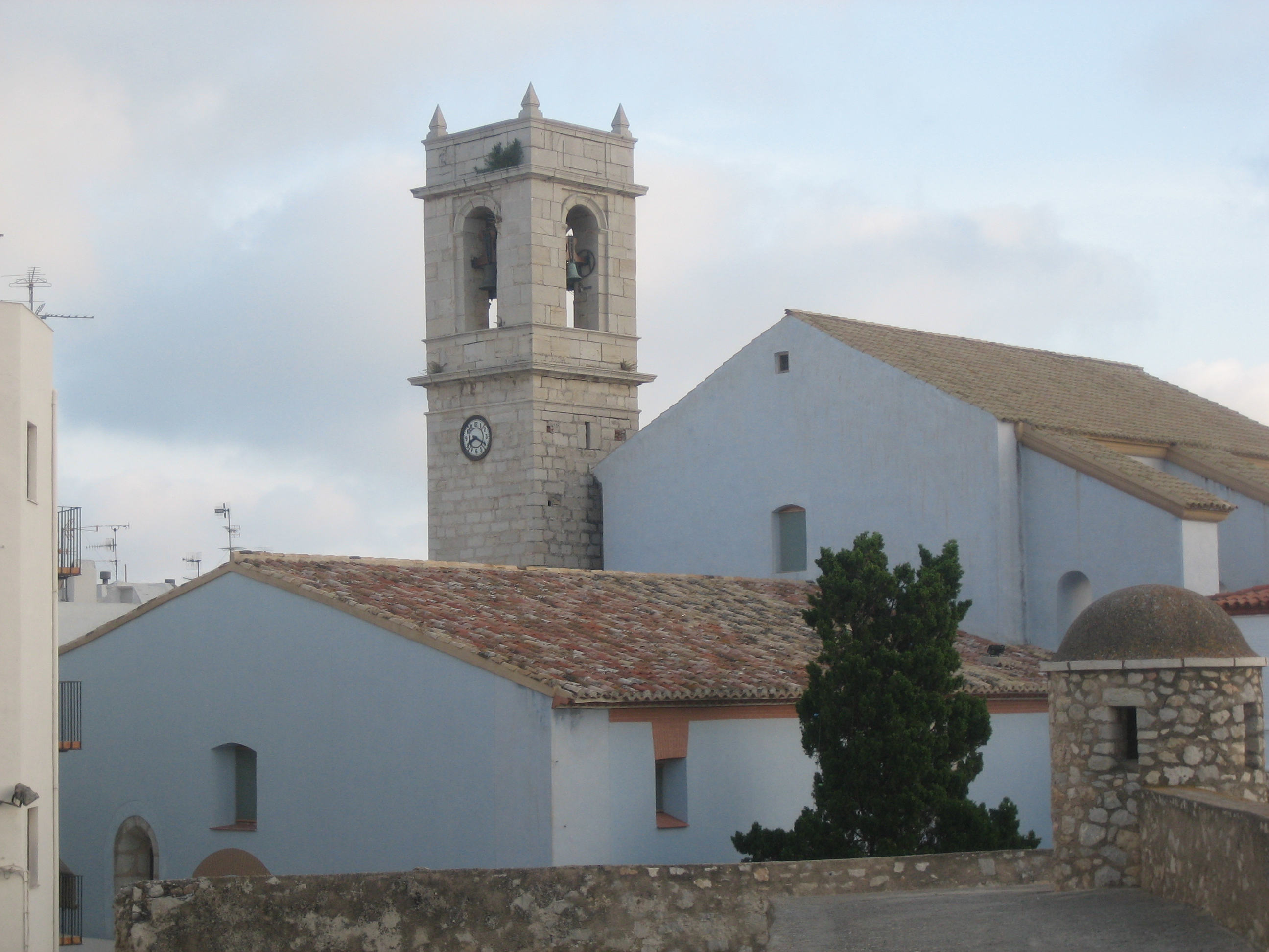 Vista de l'església de Santa Maria de Peníscola (Baix Maestrat)